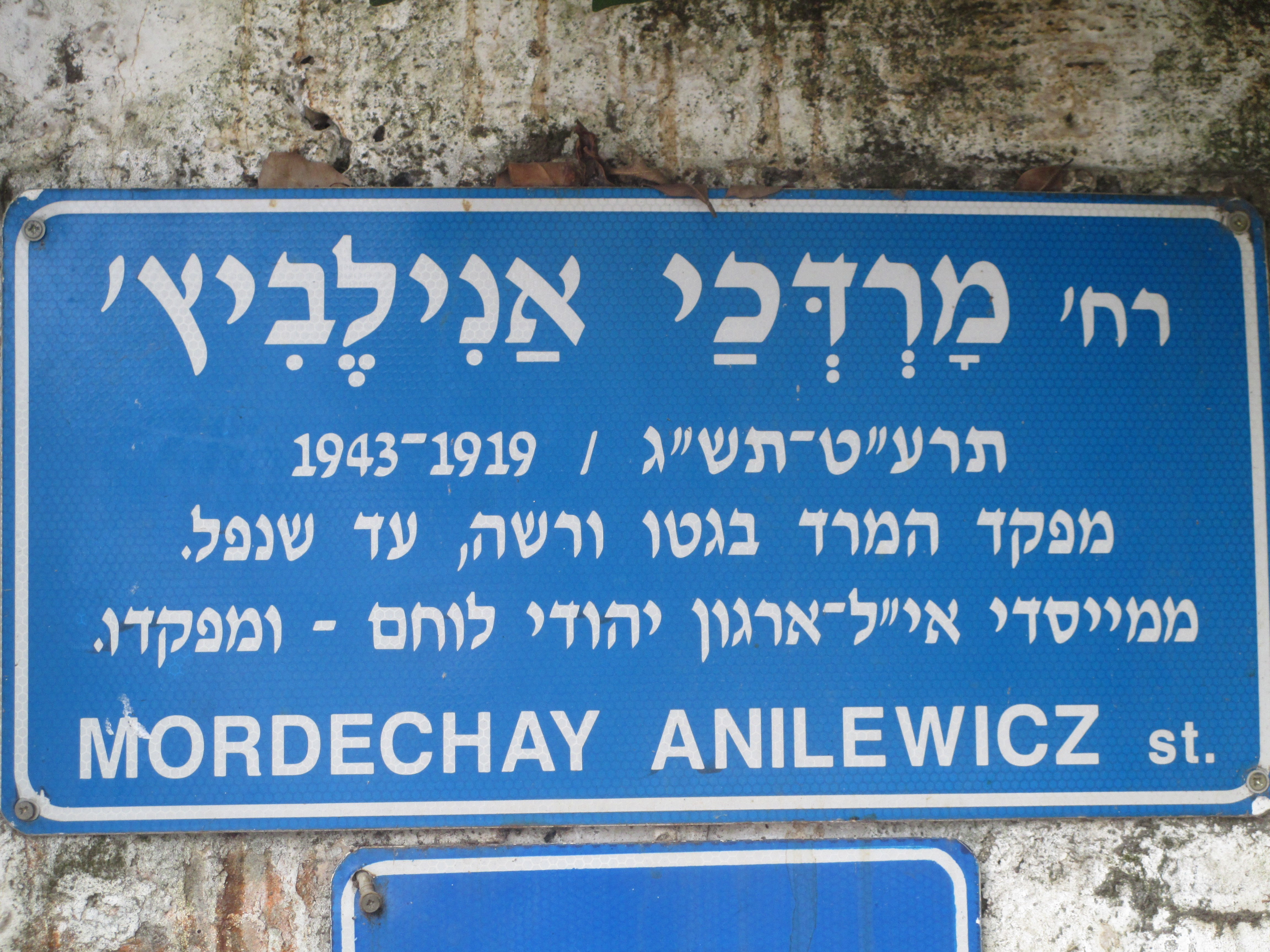 רחוב מרדכי אנילביץ' בתל אביב